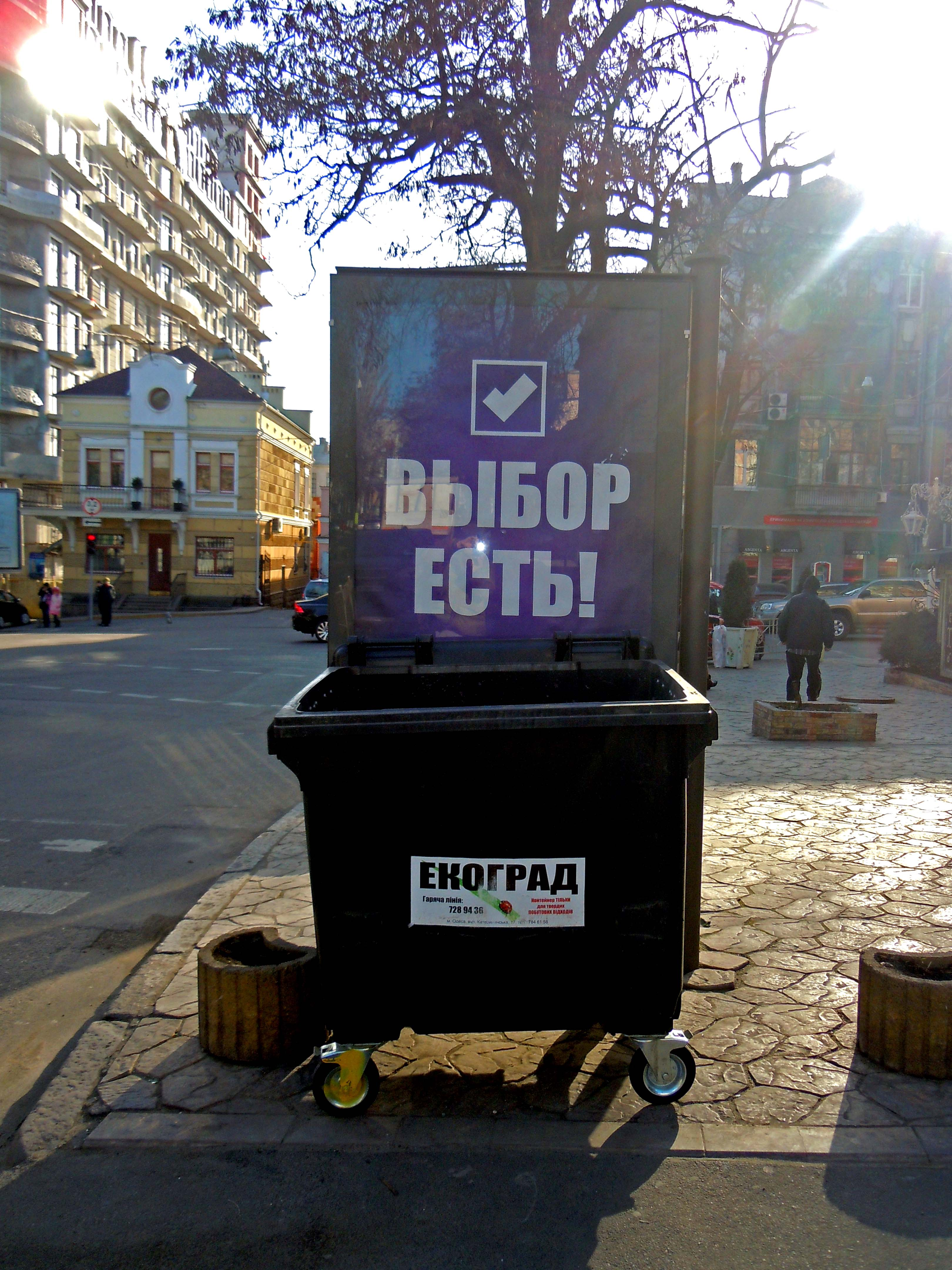 Реклама партії "Український вибір" на вулицях Одеси